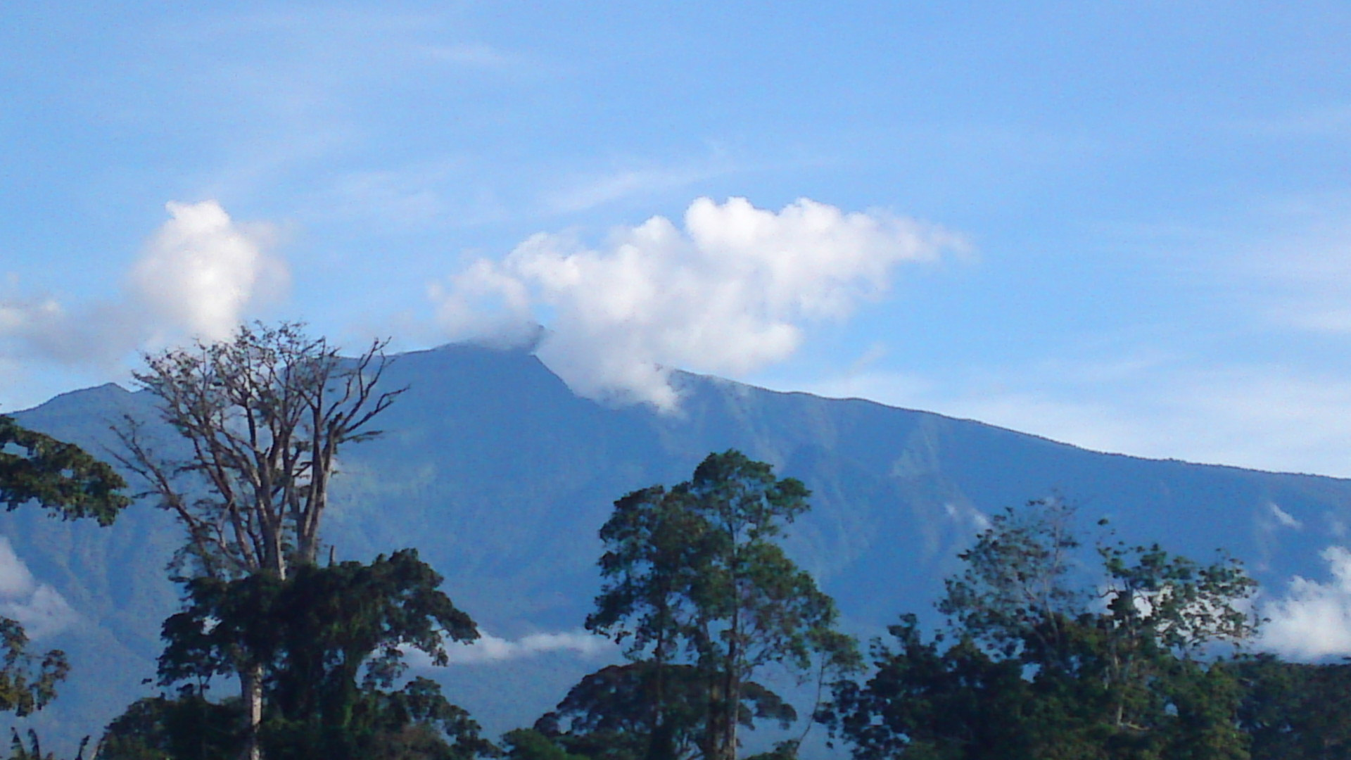 Volcan Pico Basilé sur l 'ïle de Bioko , avec un panache nuageux